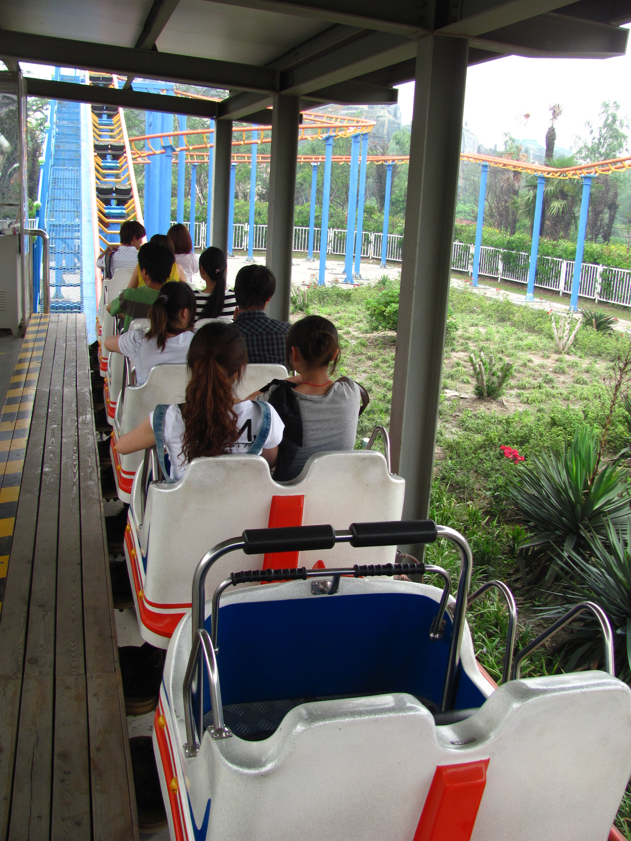 Happy Valley Shanghai